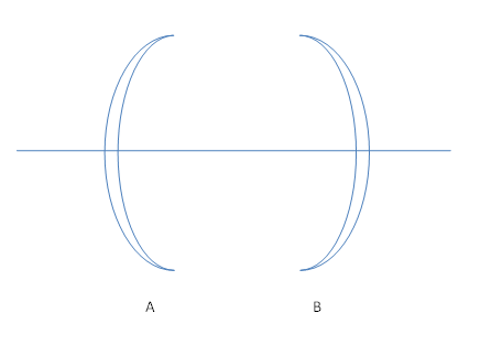 Мениски.